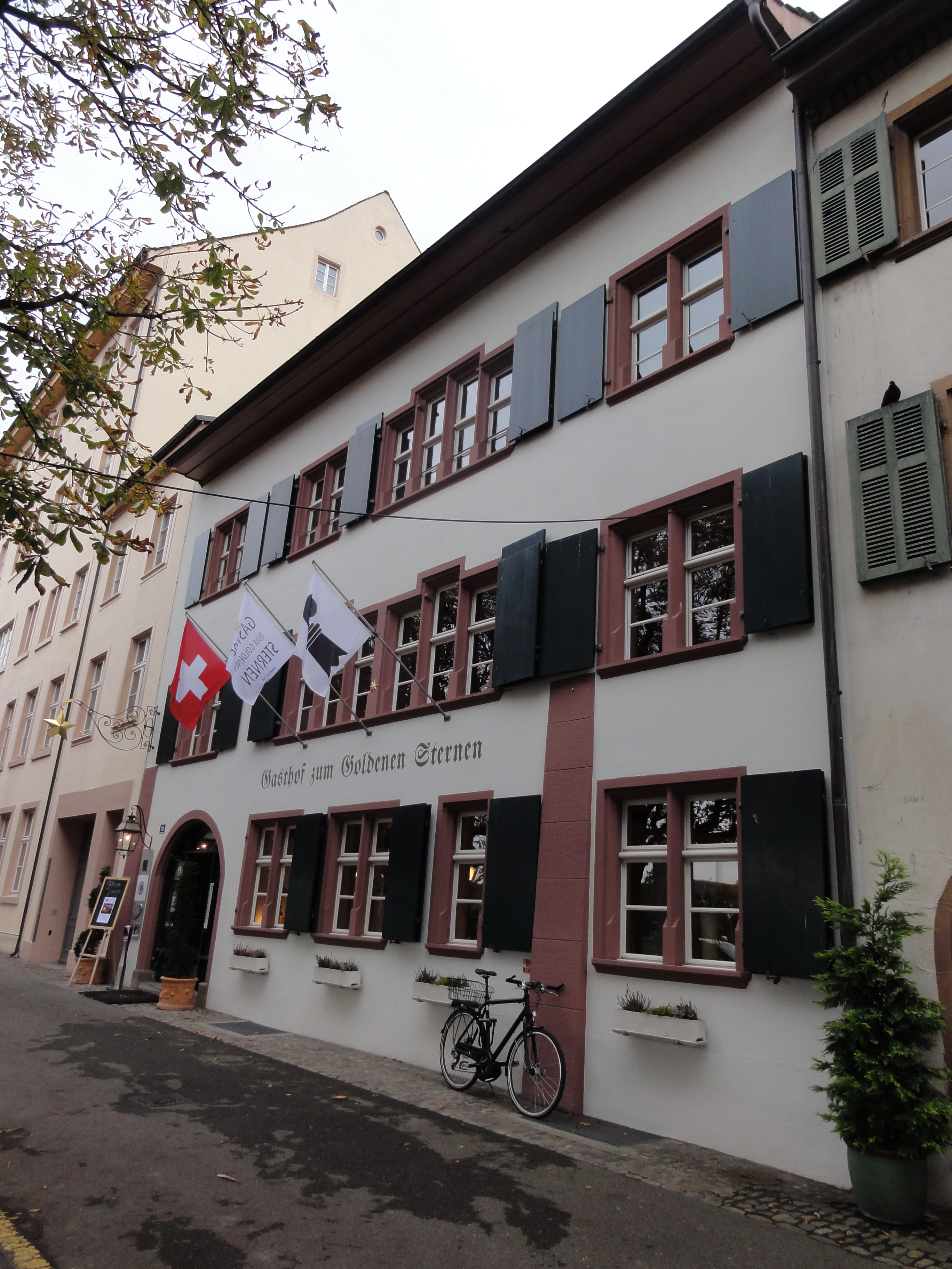 Basel — Sankt Alban-Rheinweg 70